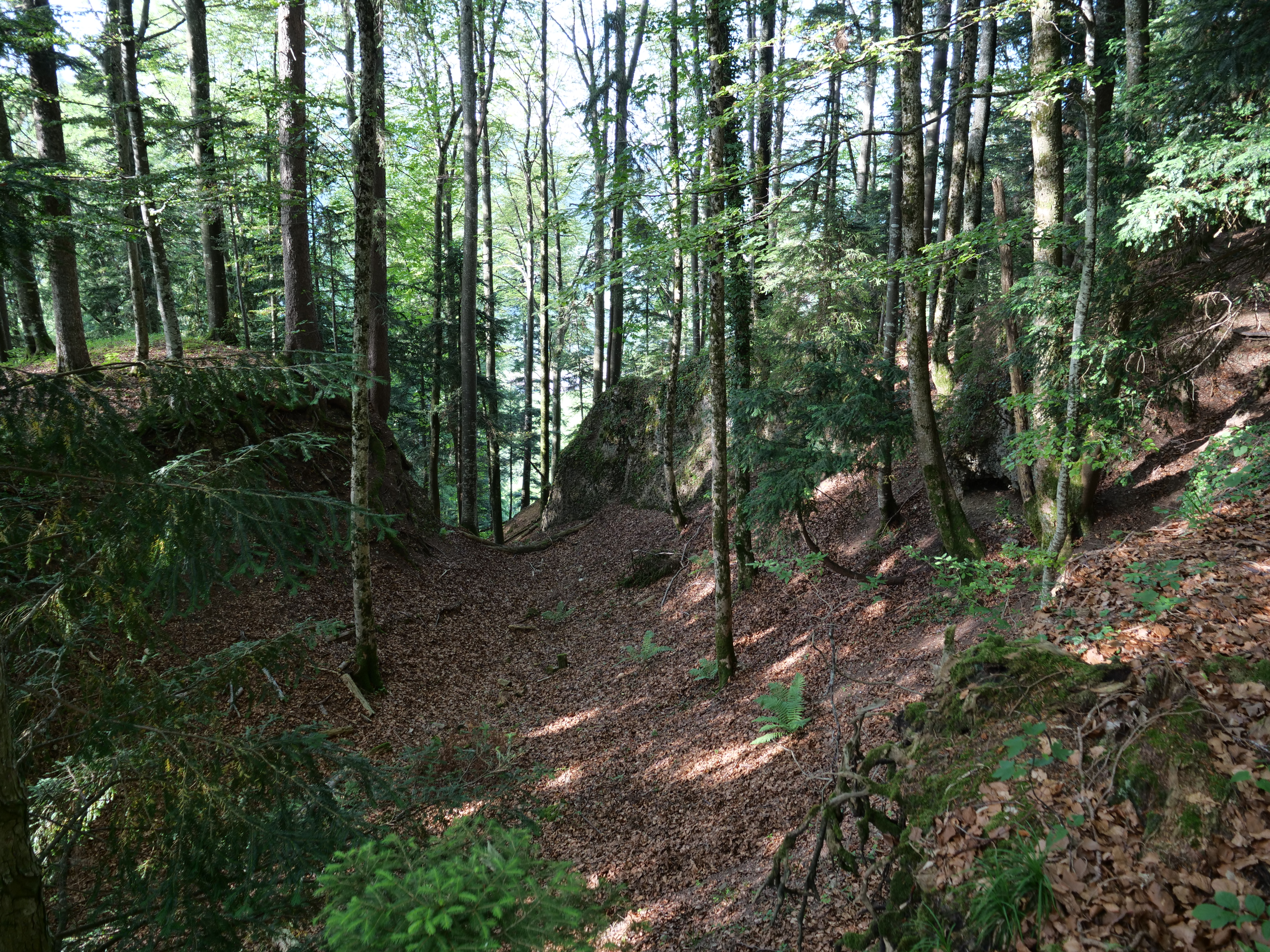 Der Halsgraben trennt den Burghügel (links) von der Vorburg ab.